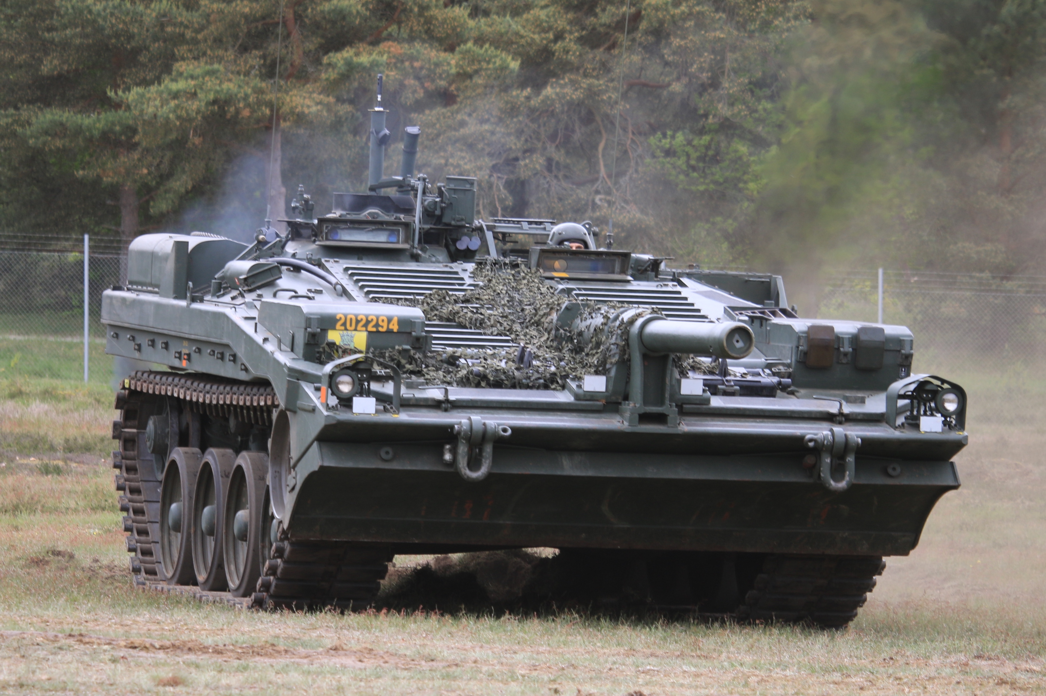 Stridsvagn 103 Revinge 2019